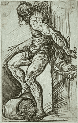 Studie für den heiligen Sebastian des Hochaltars